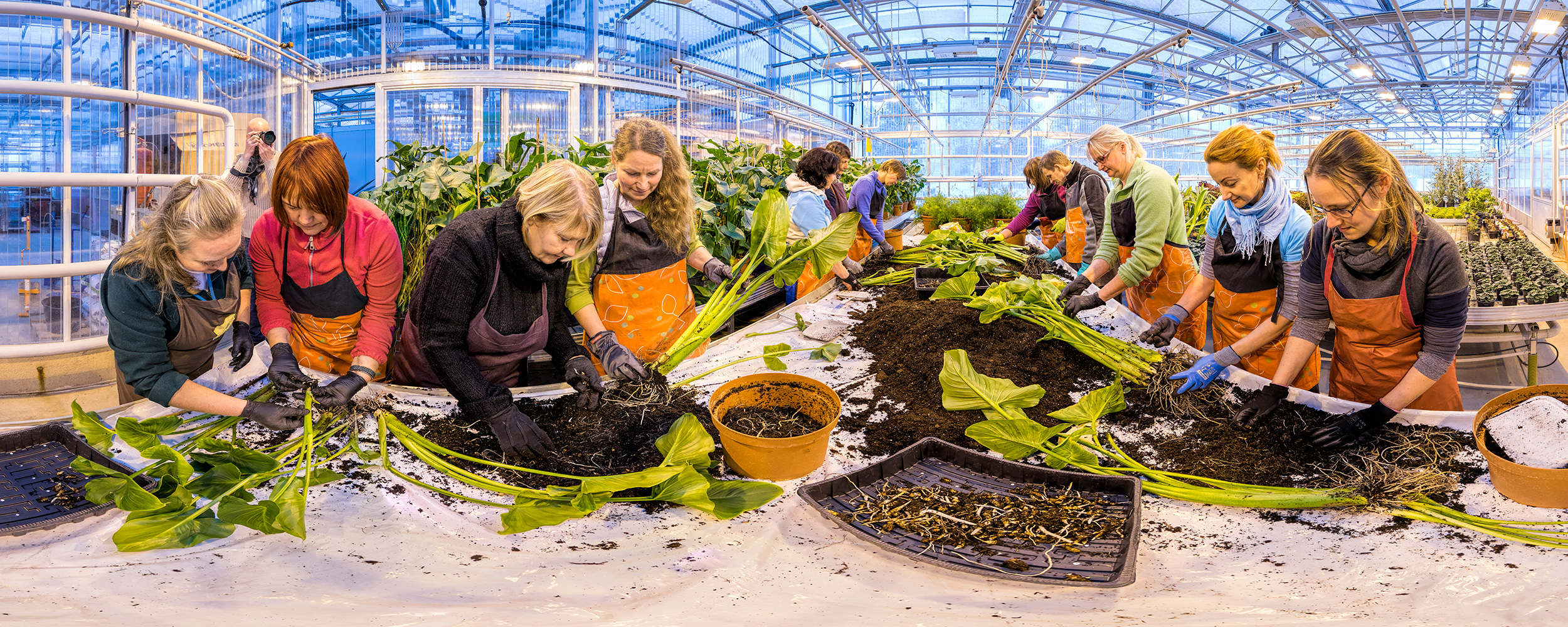 Räpina Aianduskooli kasvuhoone